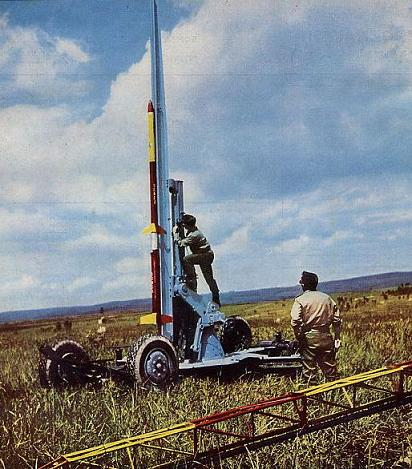 Raketa SONDA v konfigurácií S5-1-S7, na štartovacej platforme